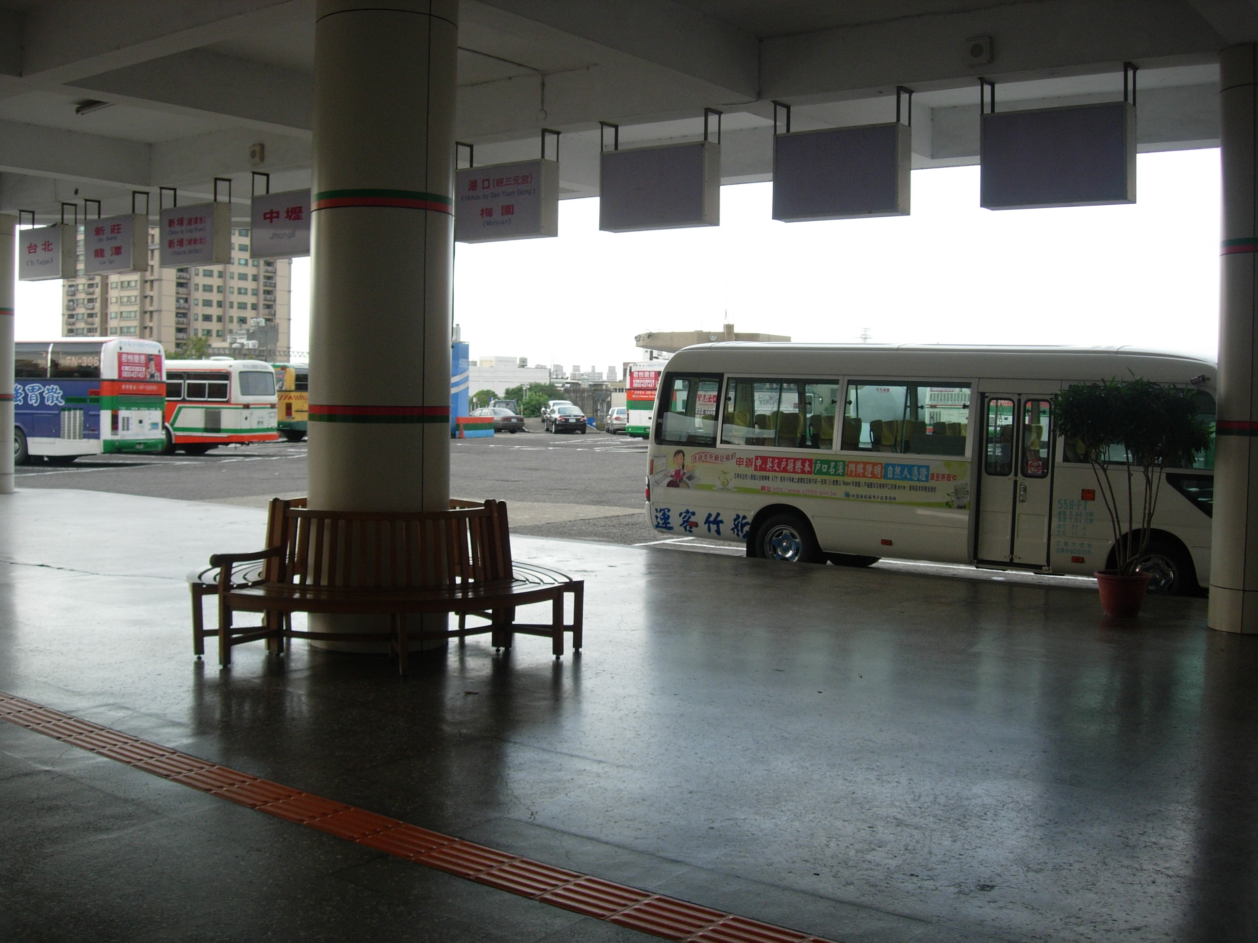 中文（台灣）: 新竹客運楊梅站月台